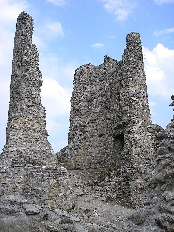 Burg Hohenfreyberg bei Pfronten (Allgäu). Die Ruine des „Bergfrieds“.